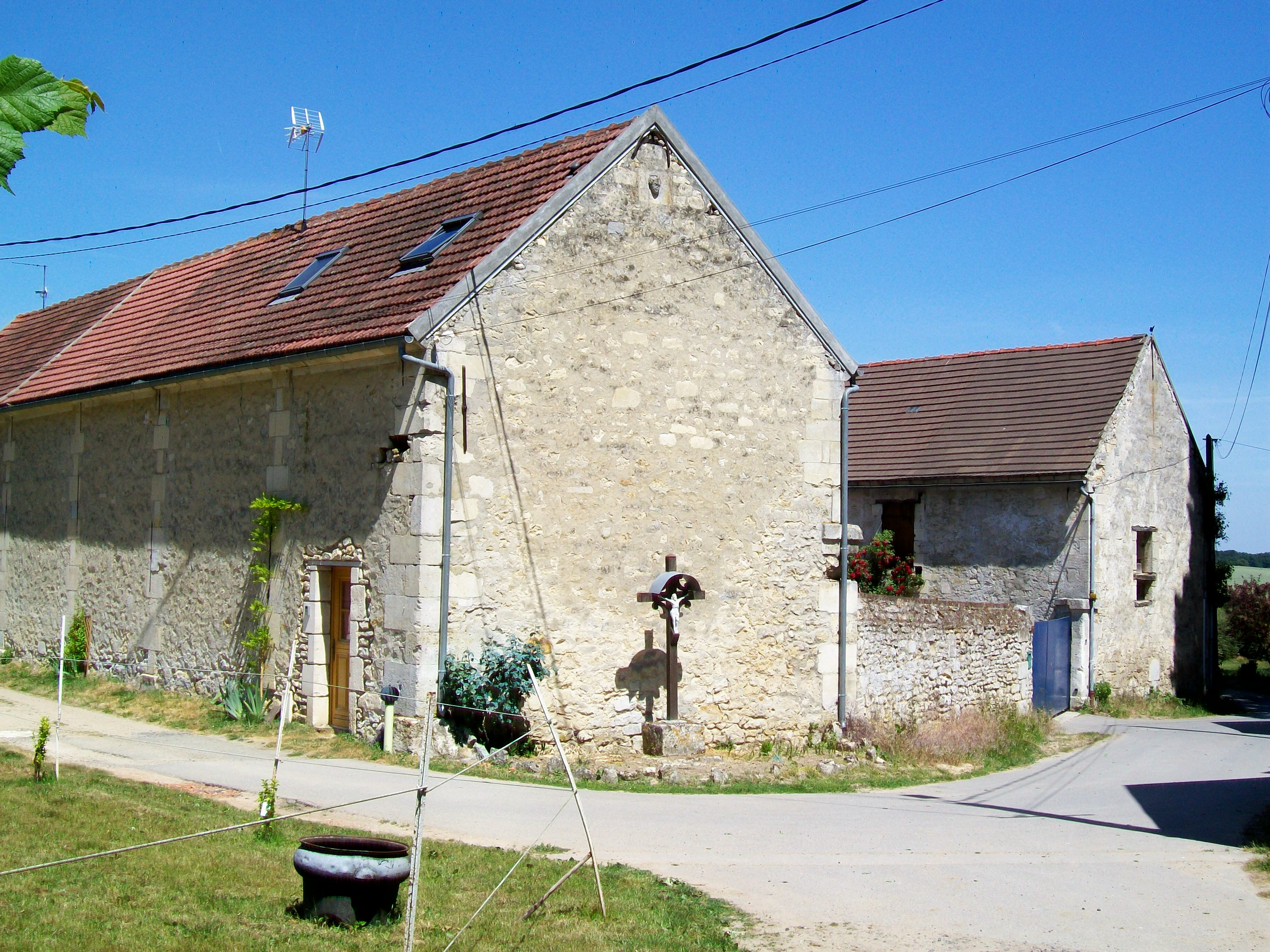 Ferme au hameau du Fond-Maillet, avec le calvaire de 1891 et tête sculptée d'origine mystérieuse, provenant d'un bâtiment disparu.